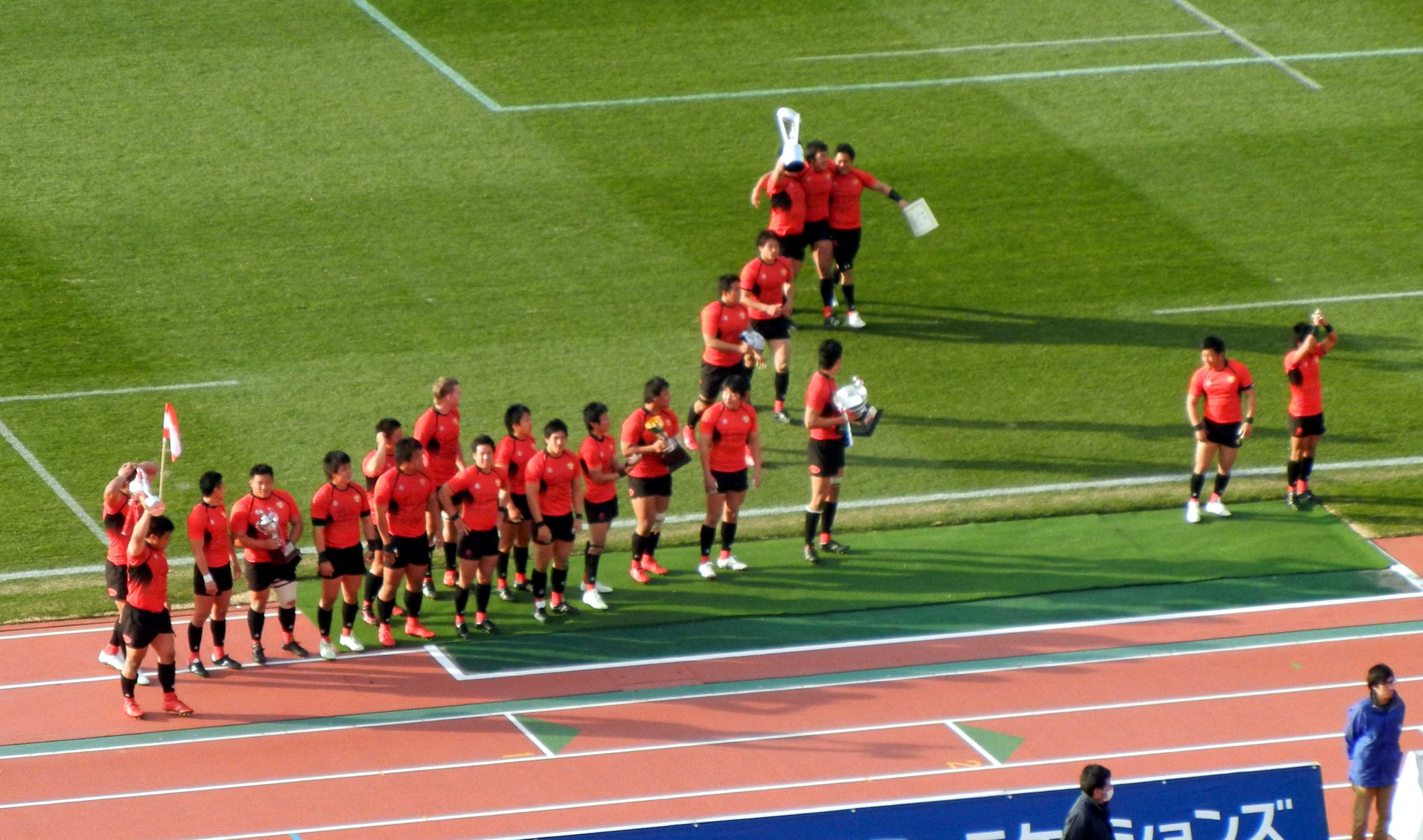 帝京大学ラグビー部 4連覇達成